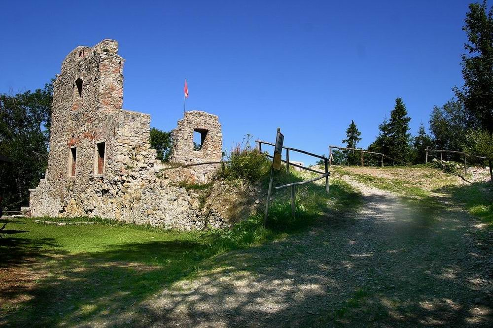 Nachdem die Seisenburg seit den 1950ern einer Ruine glich, wurde um 1998 ein Verein gegründet, der bis heute versucht das übrig gebliebene Mauerwerk zu restaurieren.